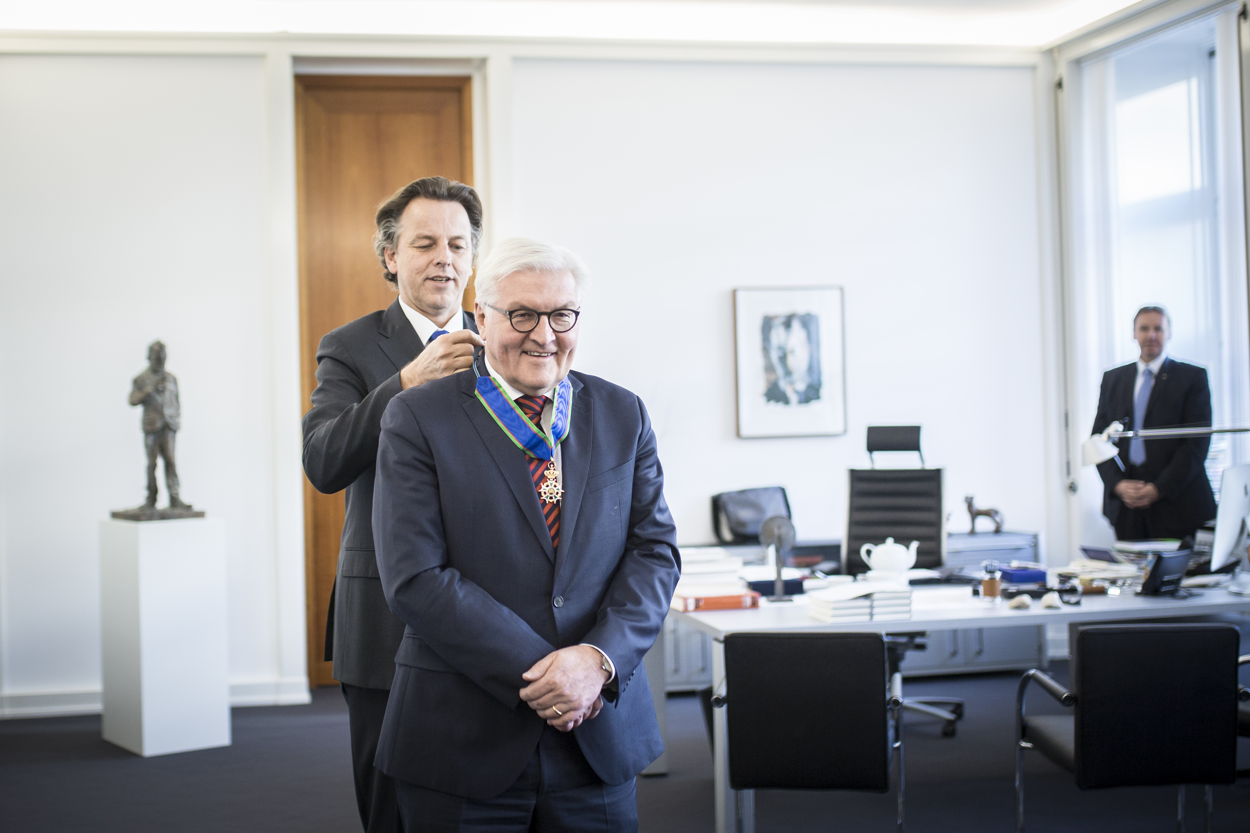 Foto: Florian Gaertner Photothek / Auswärtiges Amt De vertrekkende minister Duitse minister Steinmeier van Buitenlandse Zaken kreeg vandaag uit handen van minister Koenders het Ereteken voor Verdienste omgehangen. Nederland geeft hem deze onderscheiding voor zijn grote betekenis voor de ontwikkeling naar een verantwoordelijk en zelfverzekerd Duitsland. Dat is ook van belang voor het Nederlandse buitenlandbeleid. Frank-Walter Steinmeier is door de Duitse regering voorgedragen om bondspresident Joachim Gauck op te volgen.